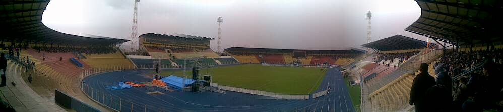 Vista Panorámica desde curva sur del Estadio Victor Agustin Ugarte, al fondo el moderno tablero electrónico.